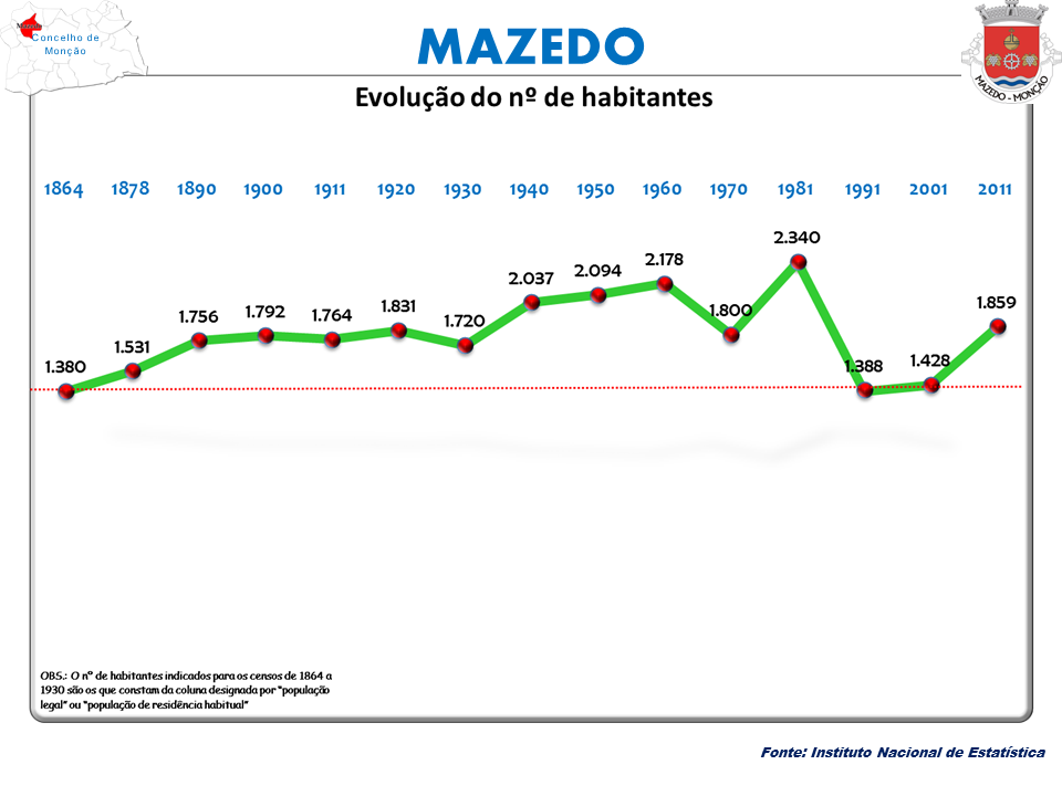 Censos 1864/2011